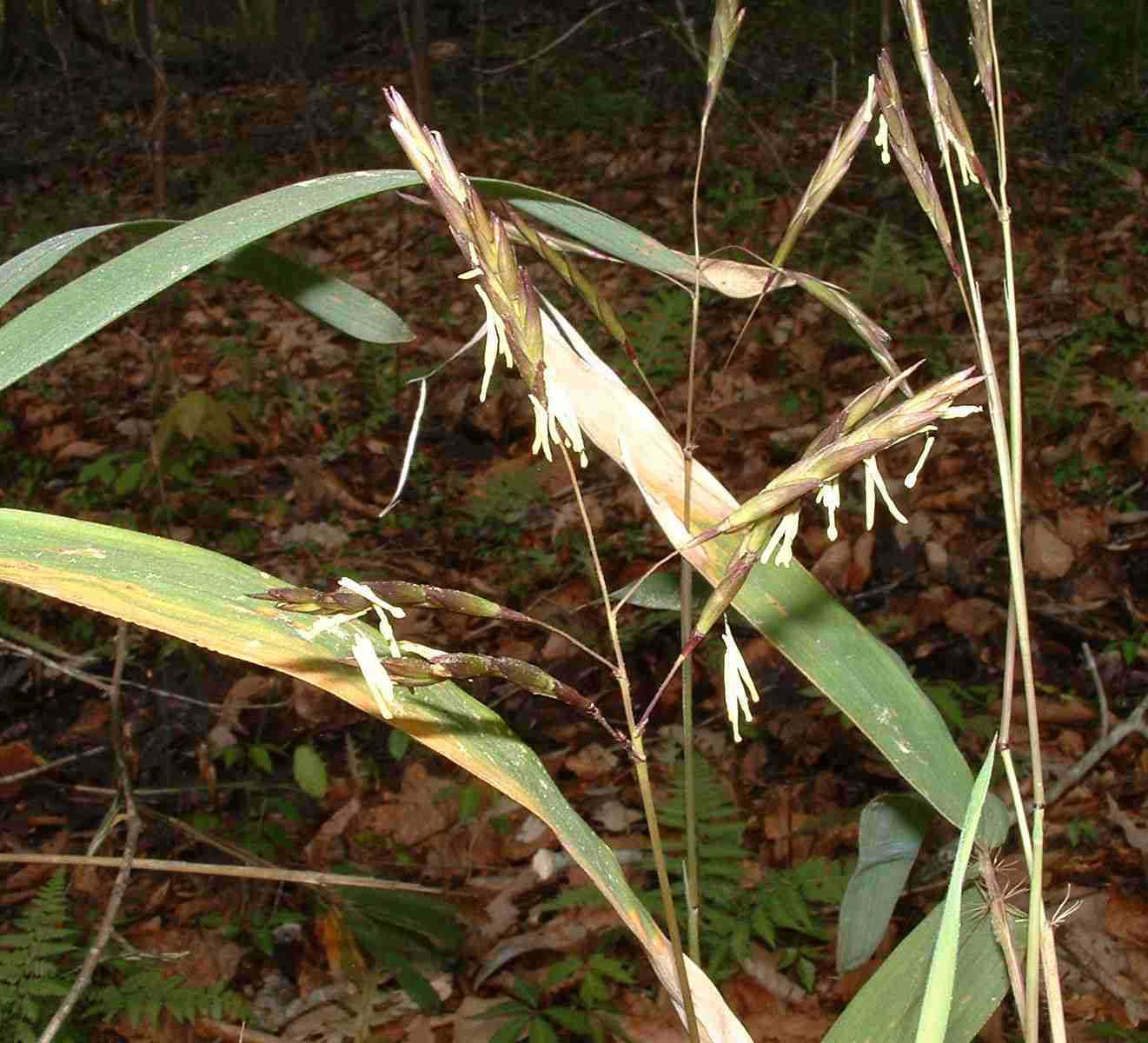 Arundinaria gigantea in bloom, Gadsden Co. FL USA